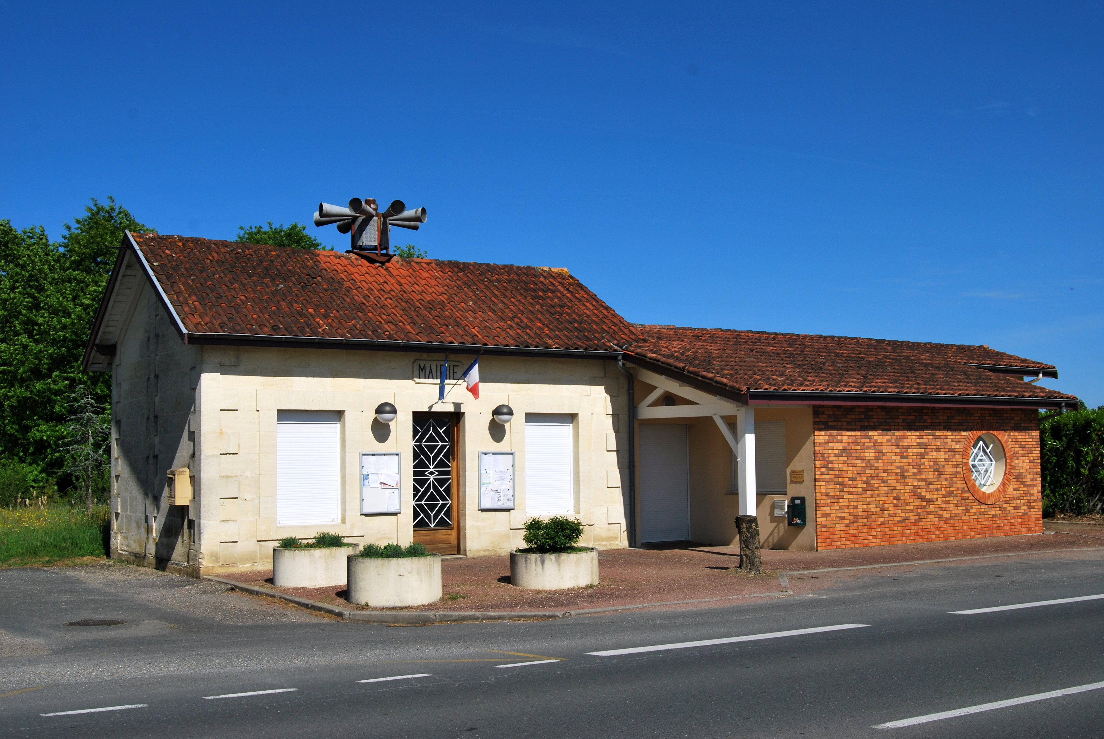 Loupes Mairie